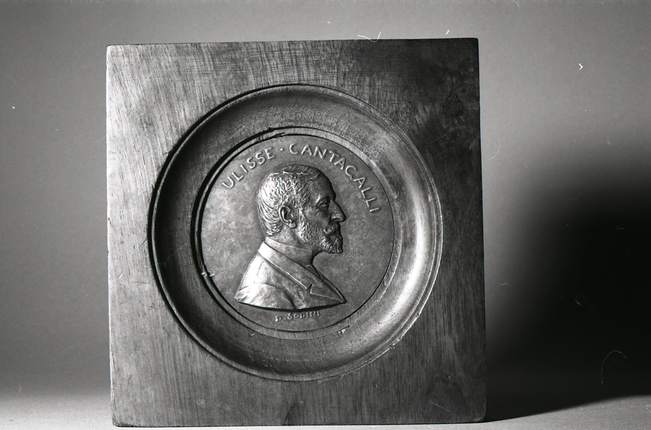 Servizio fotografico : Firenze, 1981 / Paolo Monti. - Strisce: 4, Fotogrammi complessivi: 20 : Negativo b/n, gelatina bromuro d'argento/ pellicola ; 35 mm. - ((Sul portanegativi: N[I]K[MA]T FP4. - La serie è identificata da Monti con segni grafici e distinta dalla successiva. - . - Occasione: Documentazione per la pubblicazione cataloghi del Museo del Bargello. - Fonte: Agenda di Paolo Monti: Nikon Leika 3001-/ Monti 1978 (1978-1982), presso Archivio Paolo Monti. - Fonte: Fattura di Paolo Monti: IV. Commesse/ Fattura n. 29/ Riprese fotografiche sculture, quadri, monete e medaglie e oggetti vari del Museo Bargello in Firenze (1981/10/05), presso Archivio Paolo Monti. N. 315 fotografie in b/n e N. 29 fotocolor diapositive formato 24x36 per pubblicazione cataloghi del Museo Bargello. Totale 344 fotografie. - Fonte: Lettera di Gaeta Bertelà, Giovanna: IV. Commesse/ Lettera/ Museo Nazionale del Bargello - Firenze; Soprintendenza ai Beni artistici e storici di Firenze e Pistoia (1981/07/21), presso Archivio Paolo Monti. Lettera dattiloscritta indirizzata a Monti in cui gli si comunica di intestare fattura a SPES - SAS (la suddetta fattura è pinzata insieme alla lettera)